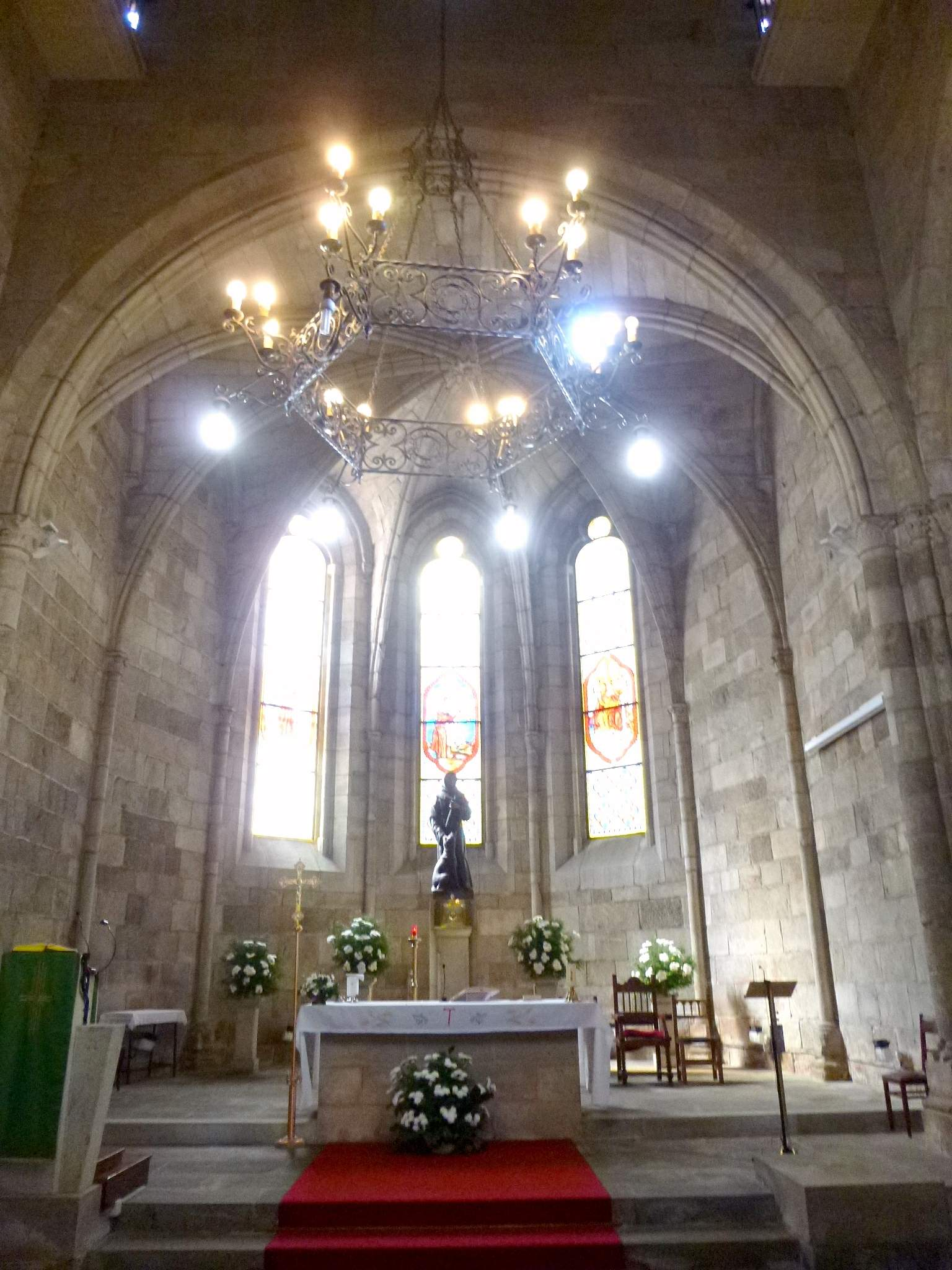 A Coruña - Iglesia de San Francisco de Asís (Franciscanos)